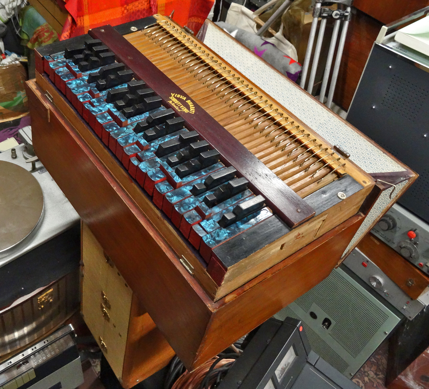 Shruti Veena